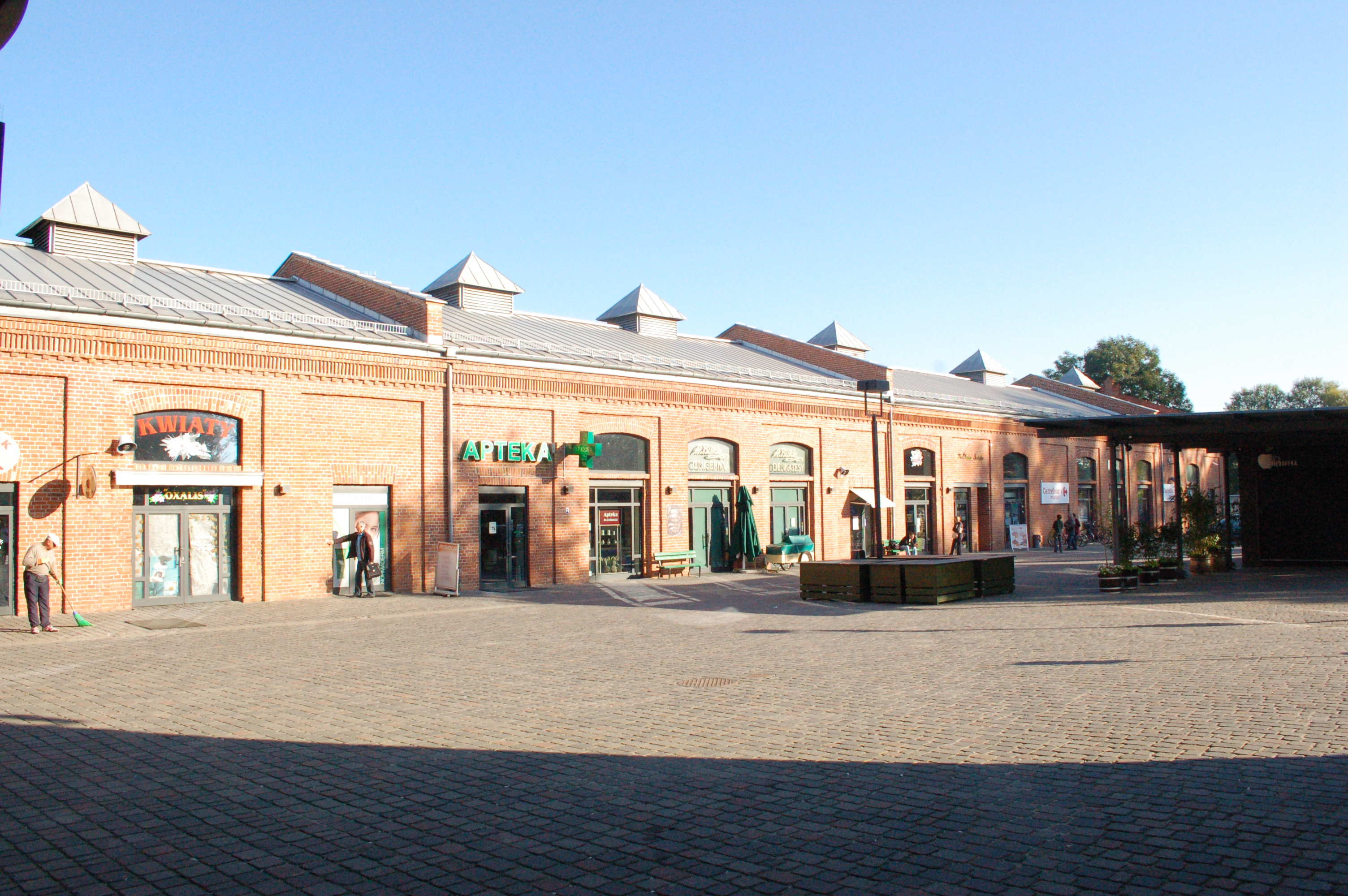 Stara Papiernia, Konstancin-Jeziorna, Shopping centre